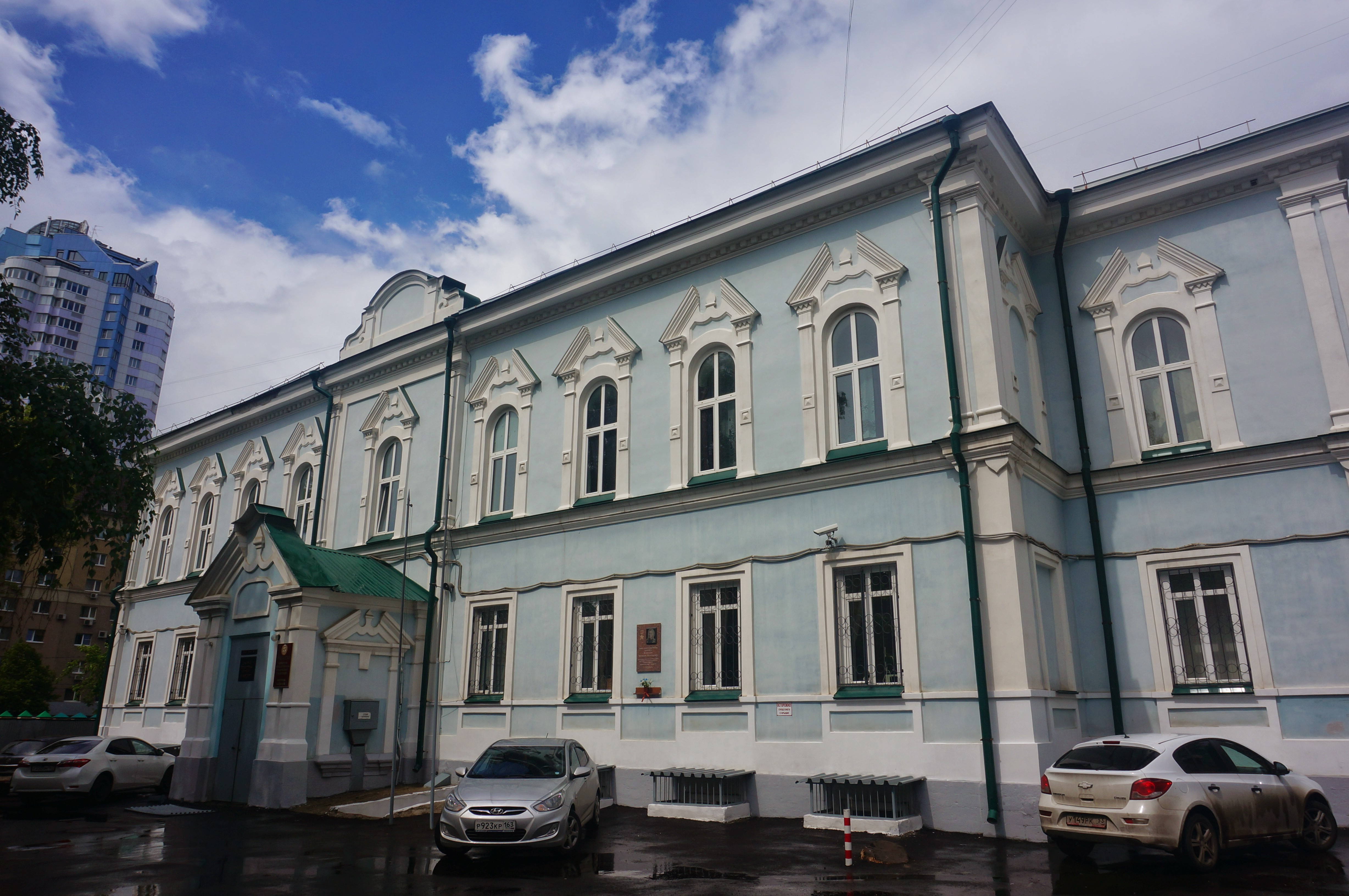 Бывший Самарский архиерейский дом, вид из проезда со стороны улицы Вилоновской